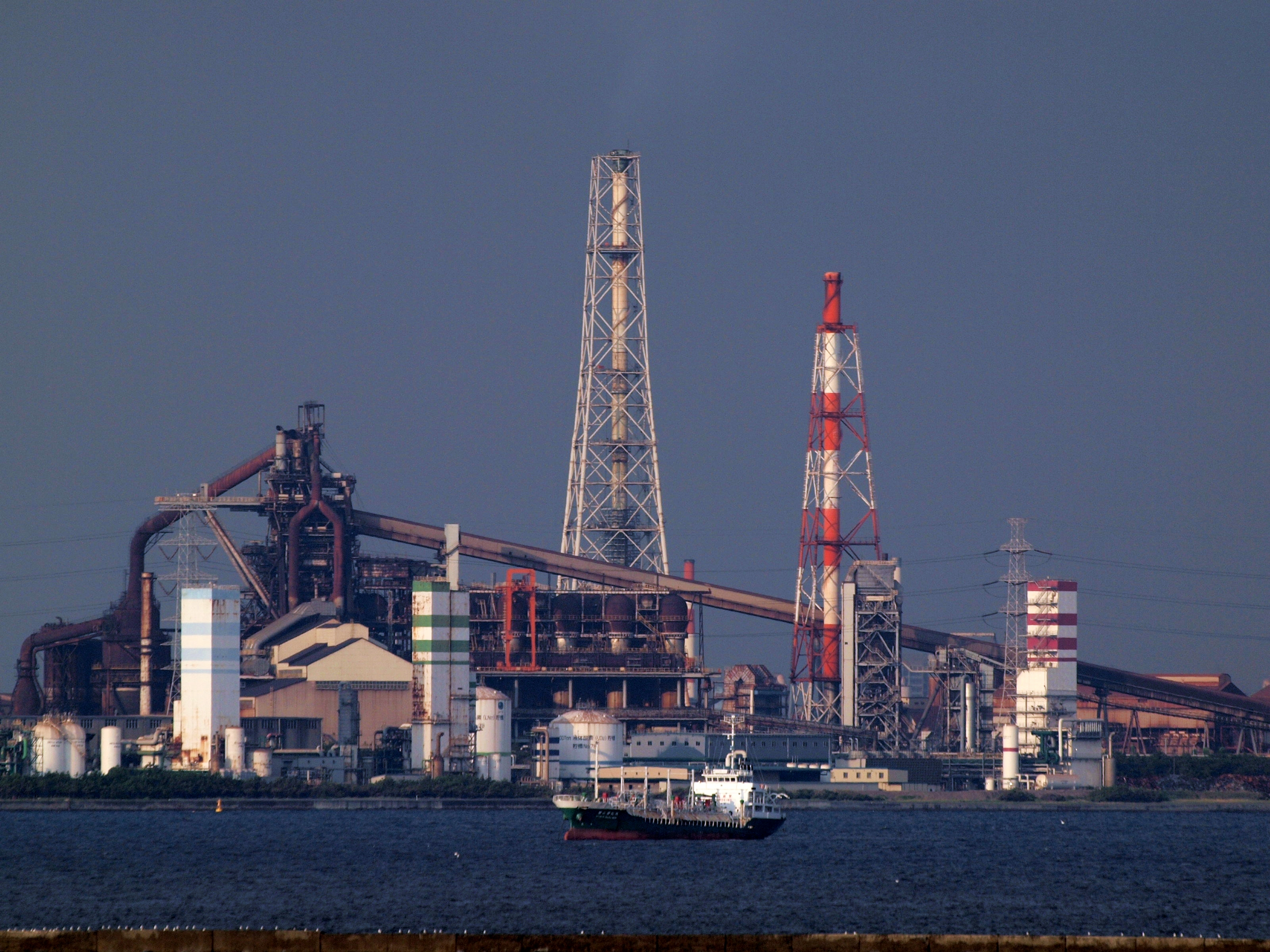 Goi , Chiba